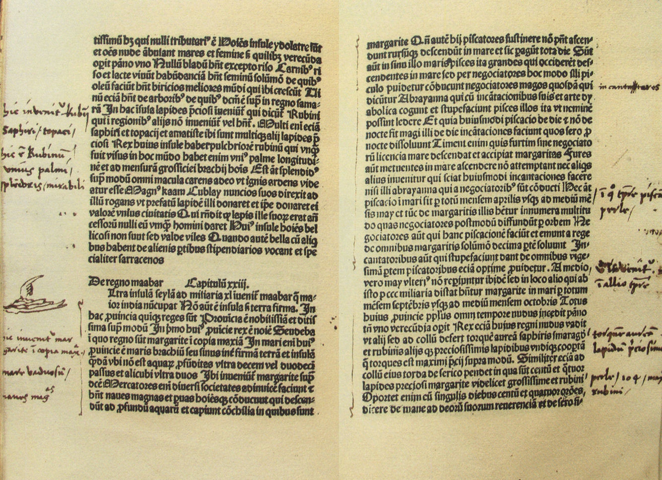 Colombus Notes on Marco Polo's "Le Livre des Merveilles", latin edition